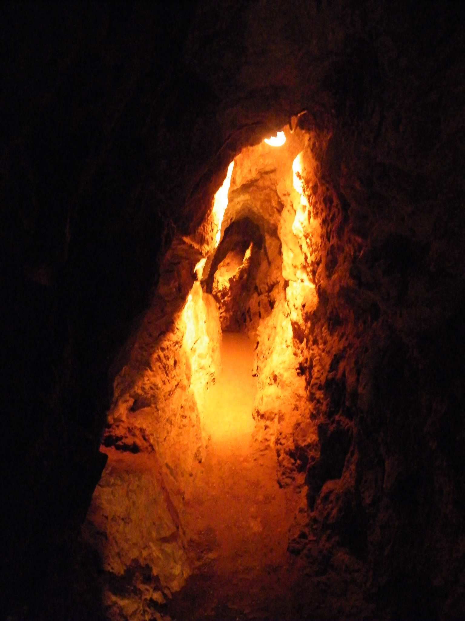 y gwaith copr